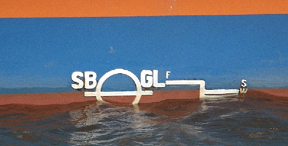 Markierungen des Germanischen Lloyd auf Schiffen (Lademarke bei Süß / Salzwasser)